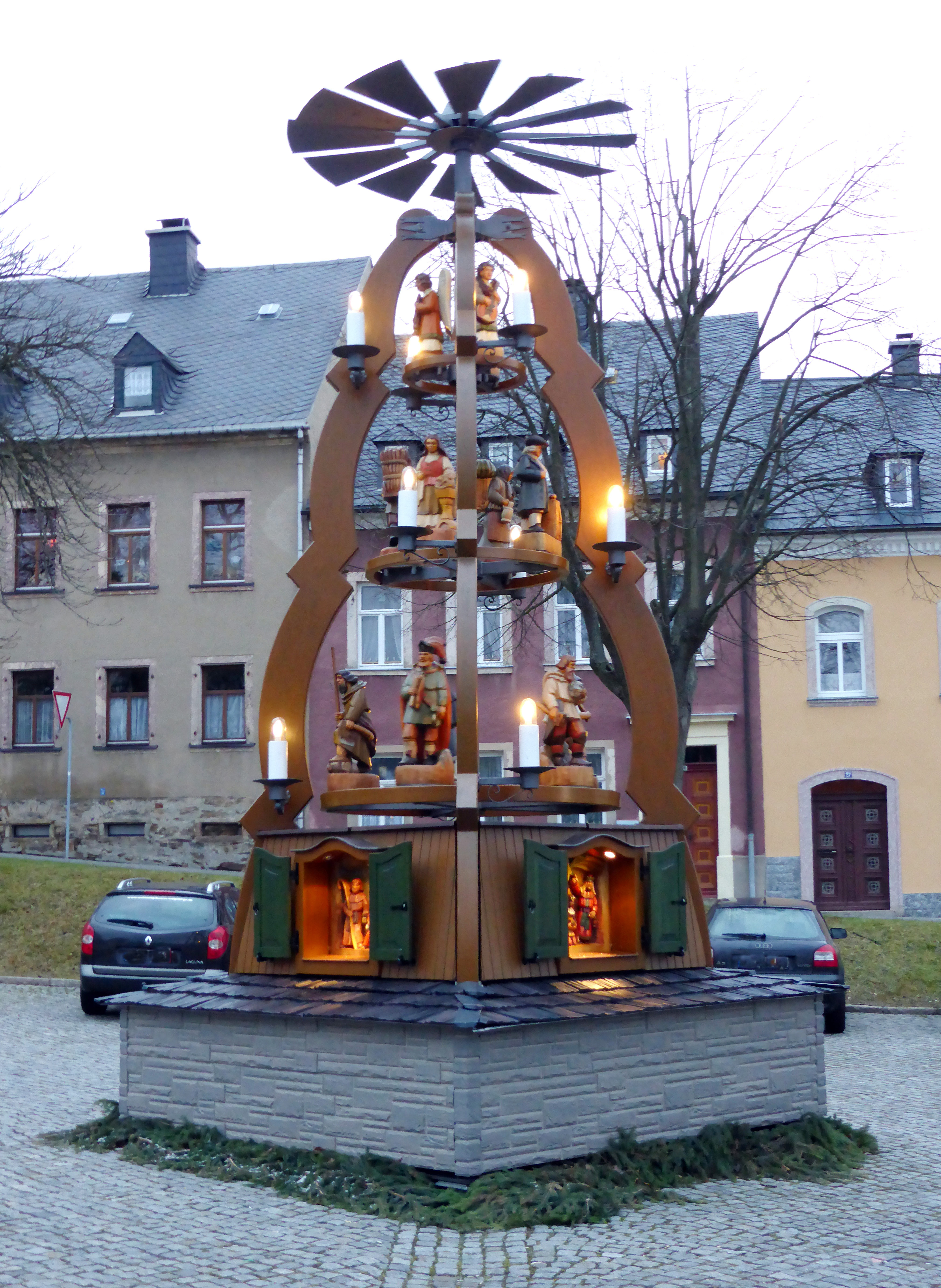 Ortspyramide in Jöhstadt, Erzgebirgskreis - Sachsen.